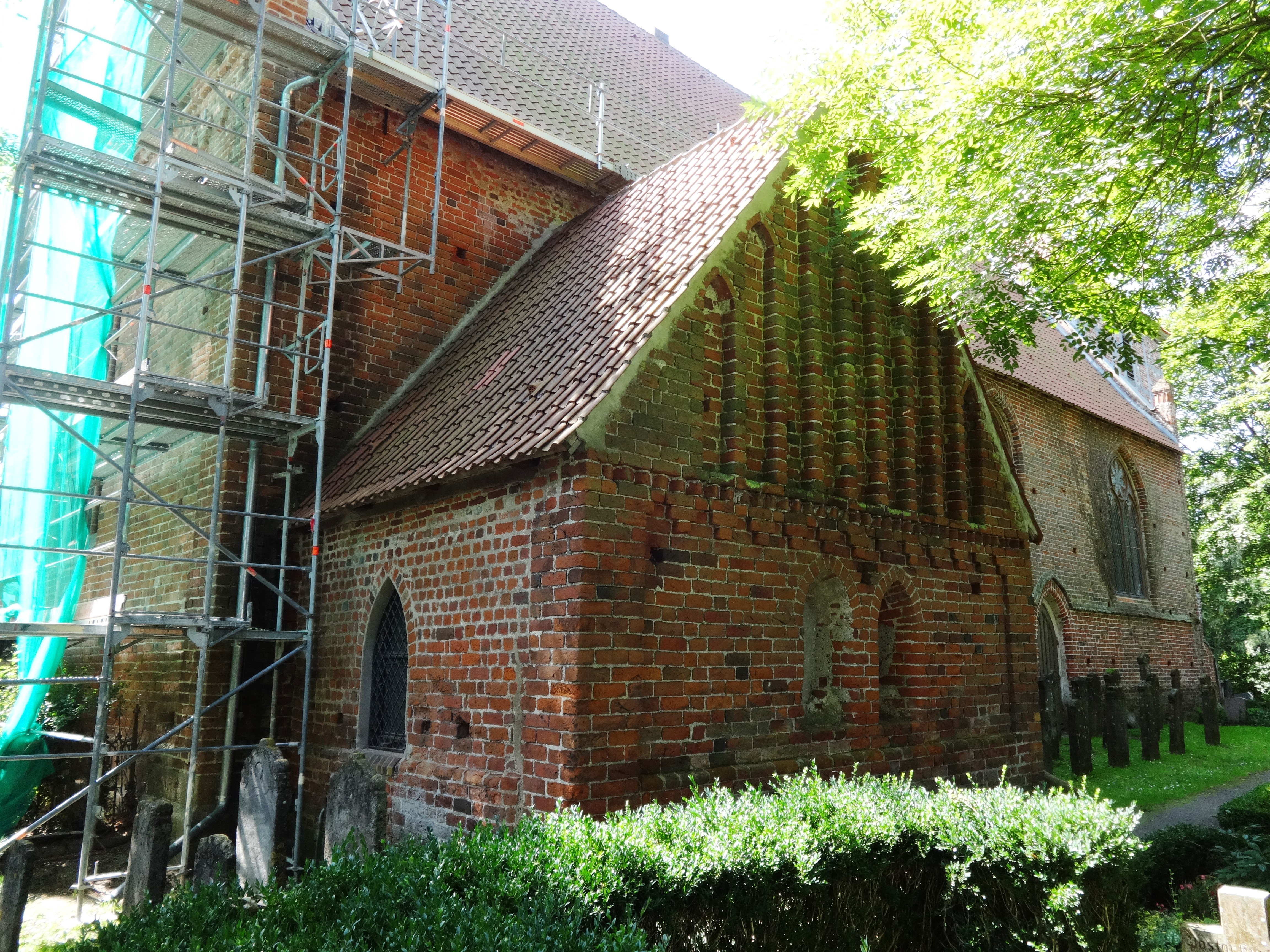 Die Dorfkirche in Neuenkirchen bei Greifswald ist ein Backsteinbau aus dem 13. und 14. Jahrhundert. Im Innern stehen mehrere Epitaphe aus dem 14. Jahrhundert sowie Wandmalereien aus dem 15. Jahrhundert.